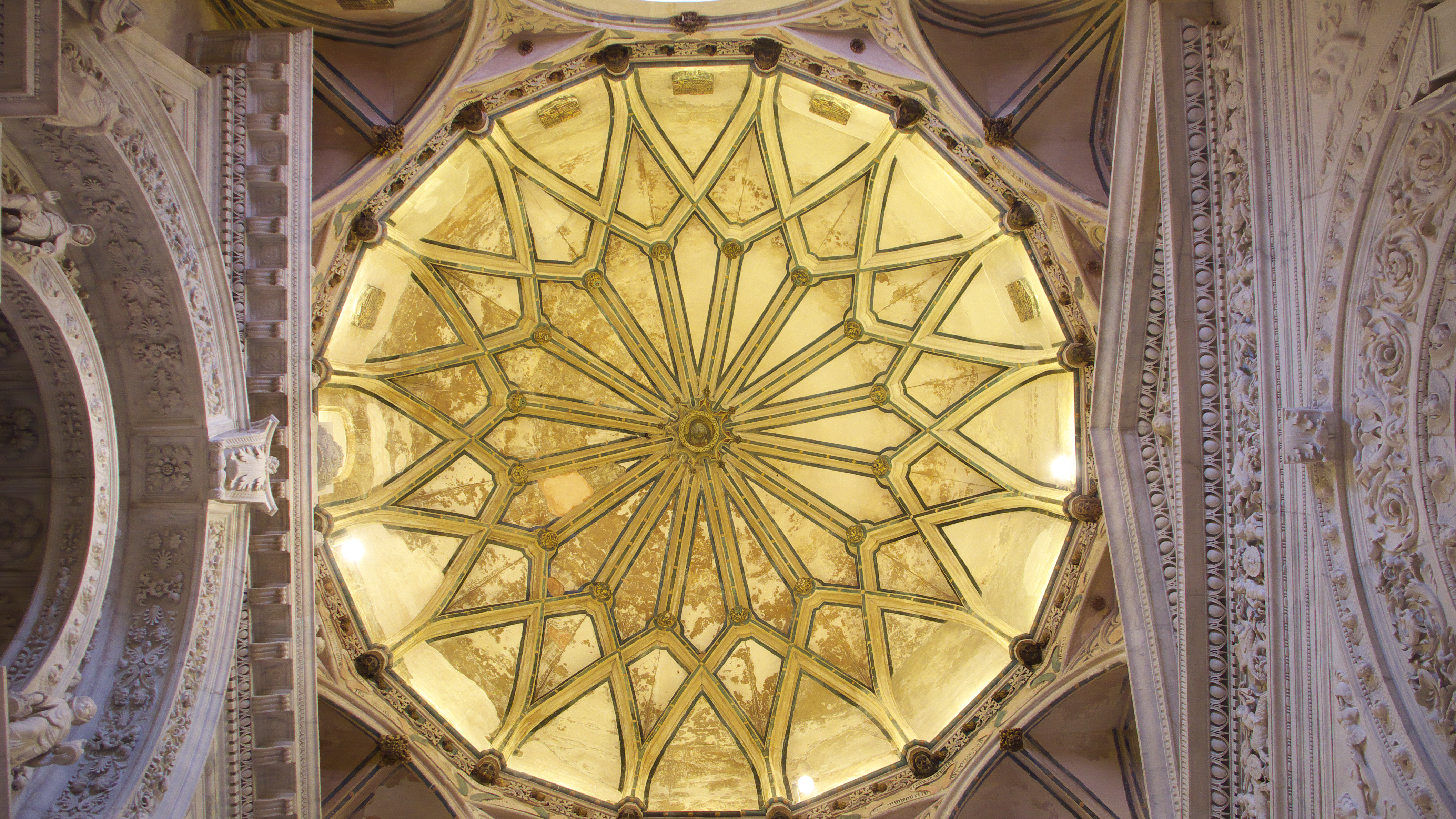 Una de las primeras manifestaciones artísticas del gótico-mudéjar sevillano.